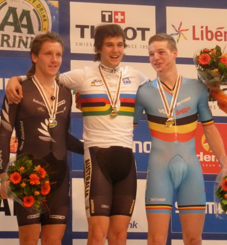 Podium Omnium bei der Bahn-WM 2011: v.l.n.r.: Shane Archbold, Michael Freiberg, Gijs Van Hoecke